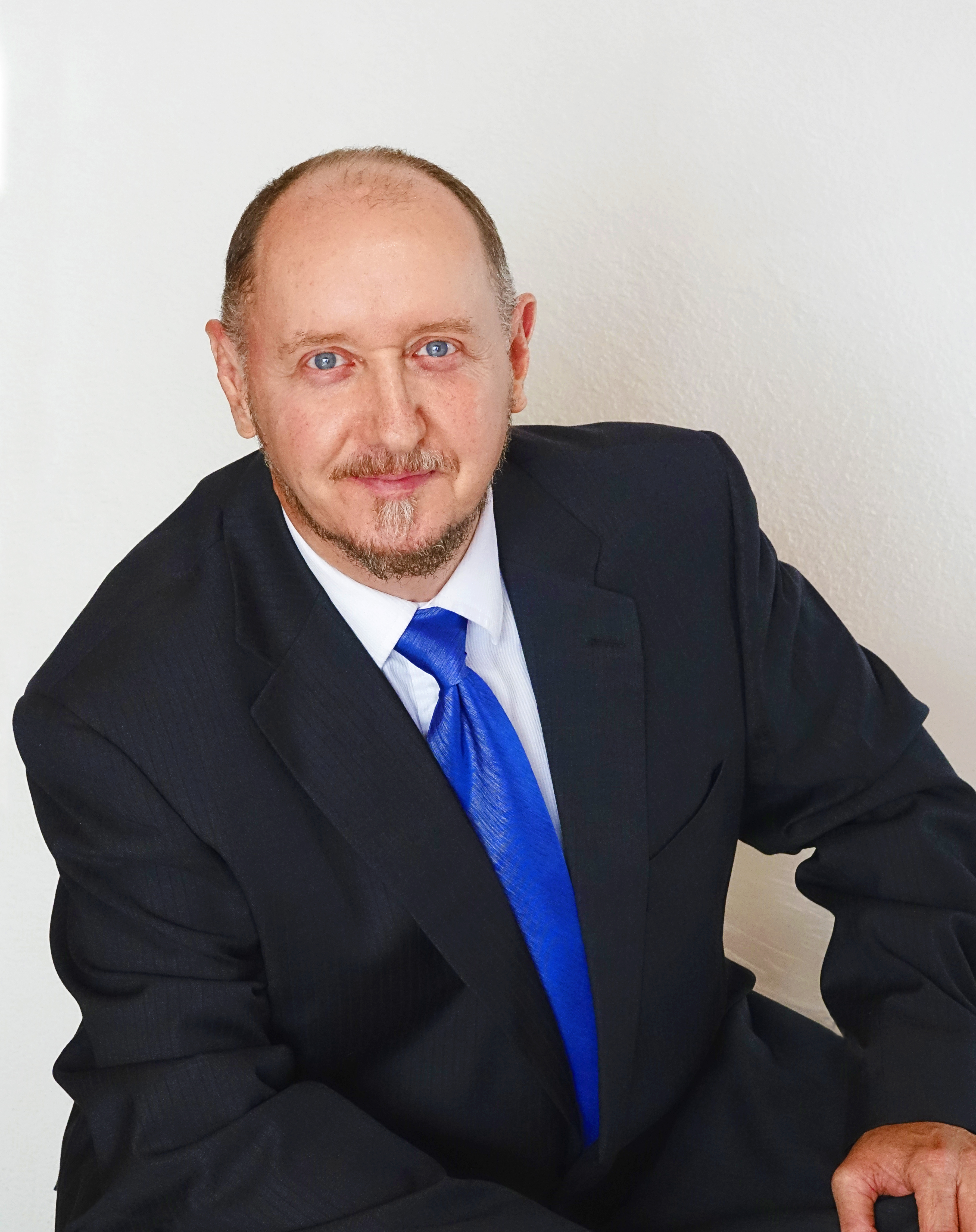 Photographie de Michel Diserens, écrivain suisse, francophone. Prise le 6.10.2018 par lui-même (libre de droits).